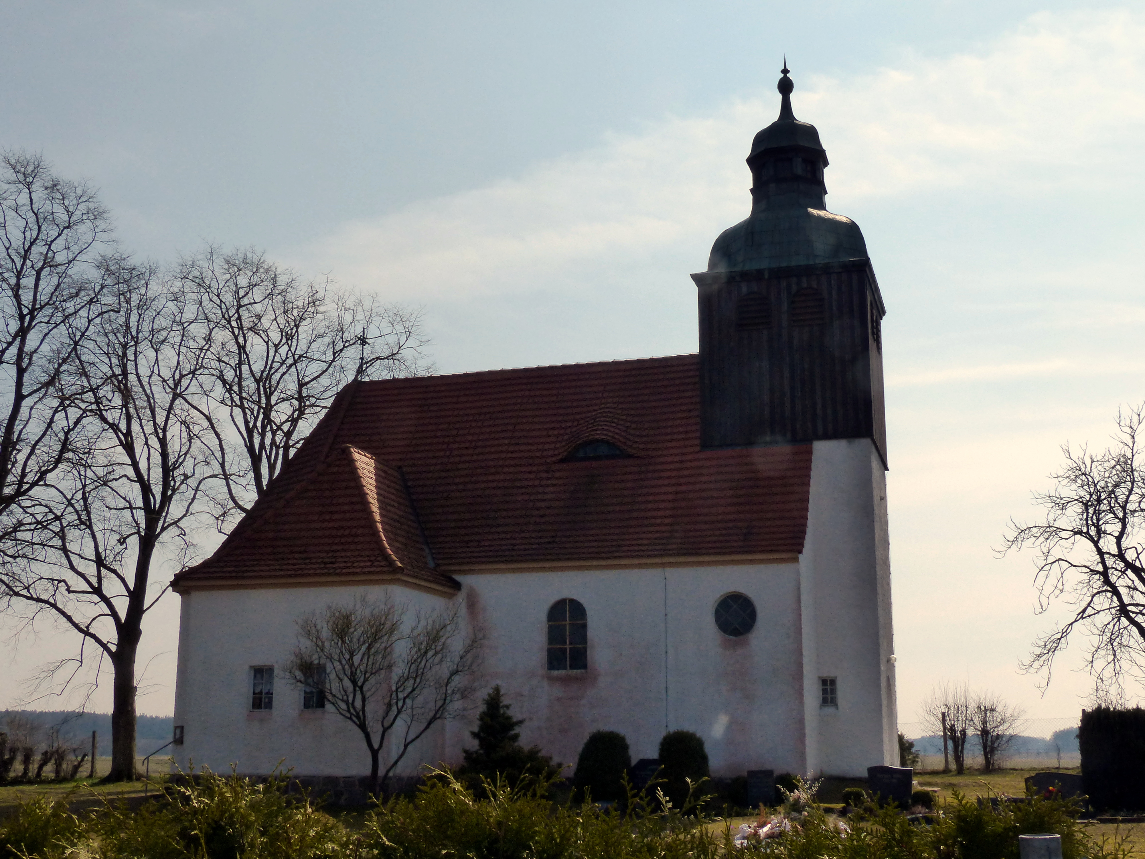 Kirche St. Michael in Zemitz, Nordseite